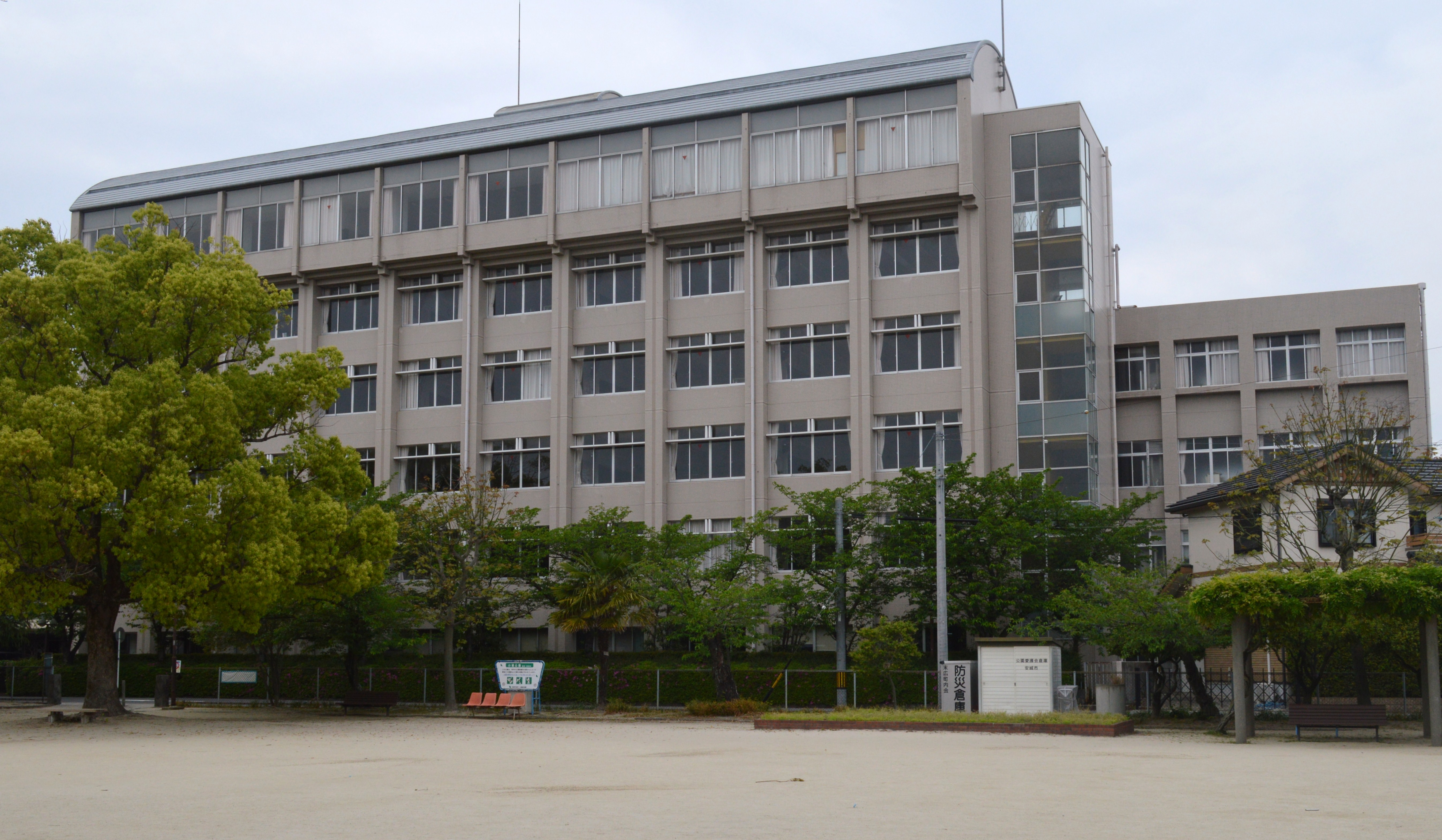 安城学園高等学校 愛知県安城市